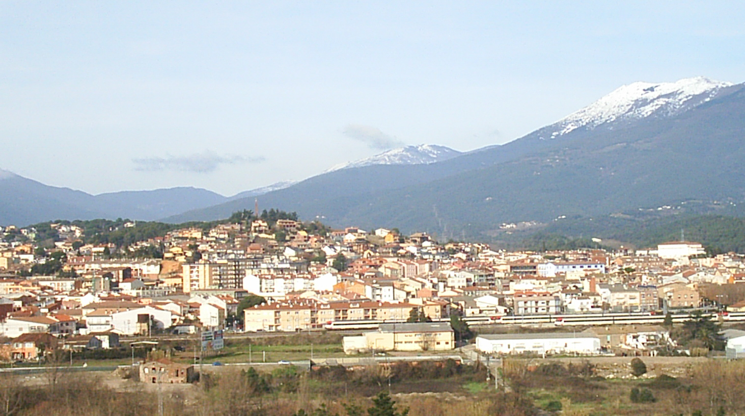 El Turó del Puig de Bellver és el cim en primer terme que està coronat per un campanar. A sota està la ciutat de Sant Celoni i al fons el massís del Montseny